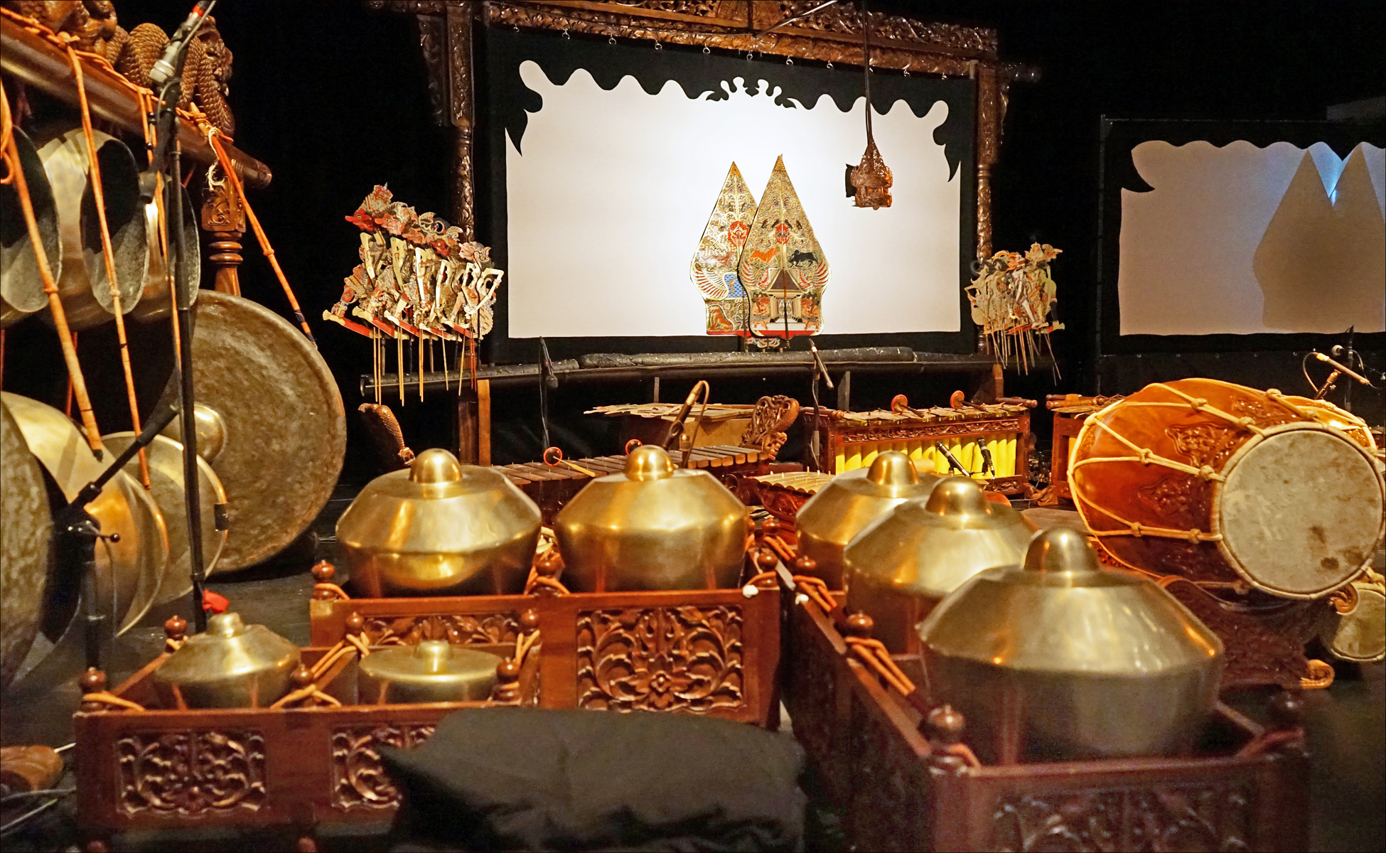 Avant la représentation, sur la scène de l'auditorium du musée Guimet, l'orchestre et le théâtre d'ombres Compagnie Jeux de Vilains Avec Cécile Hurbault (dalang), les musiciens du gamelan et la complicité de Ki Widodo Wilis (île de Java) Site du musée national des arts asiatiques - Guimet